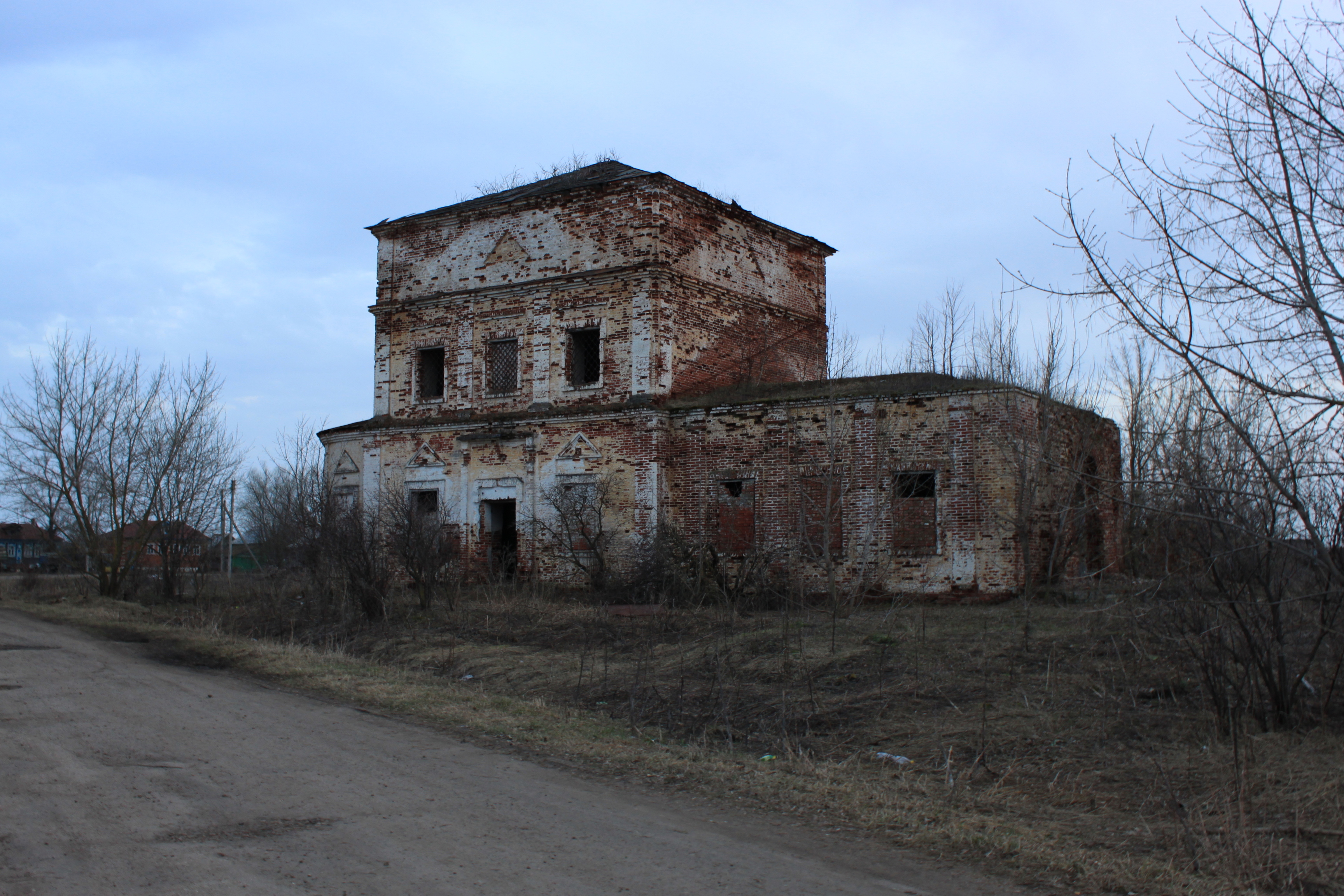 Веригино Арзамасский район